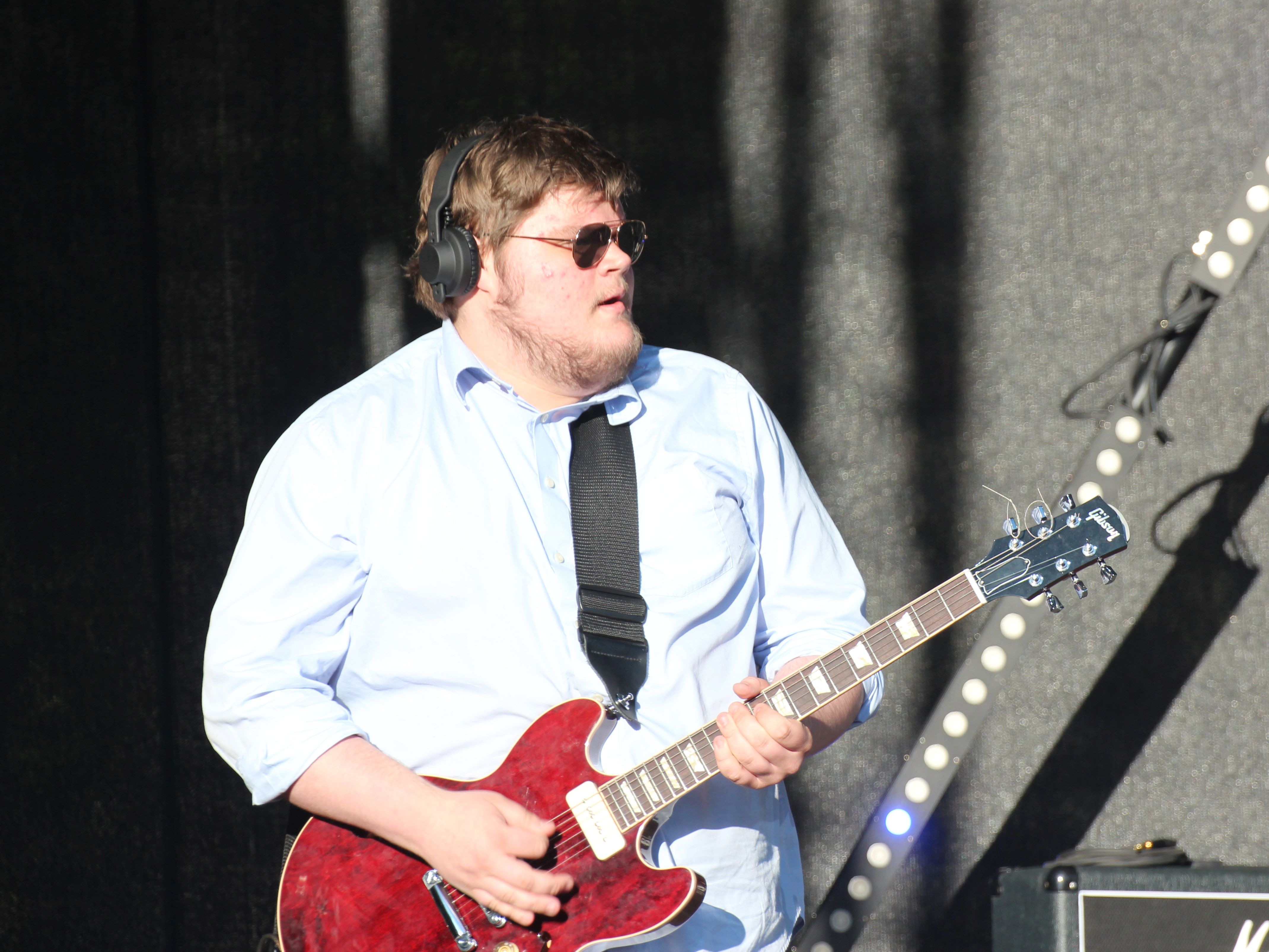 Eric Kammiste esinemas ansambli Põhja-Tallinn koosseisus